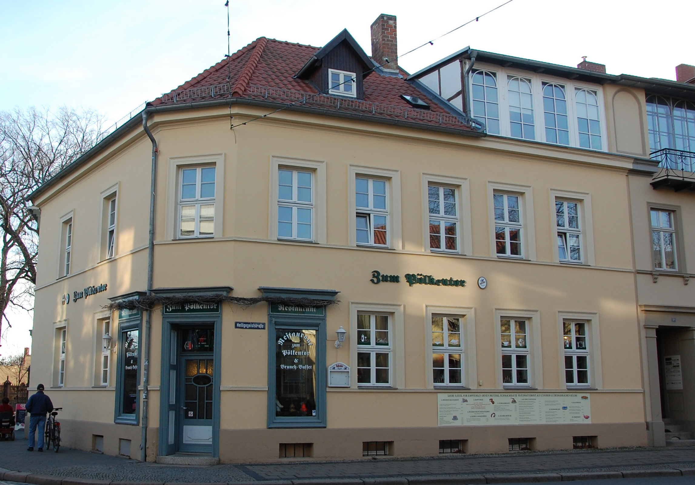 Haus Heiligegeiststraße 11 in Quedlinburg